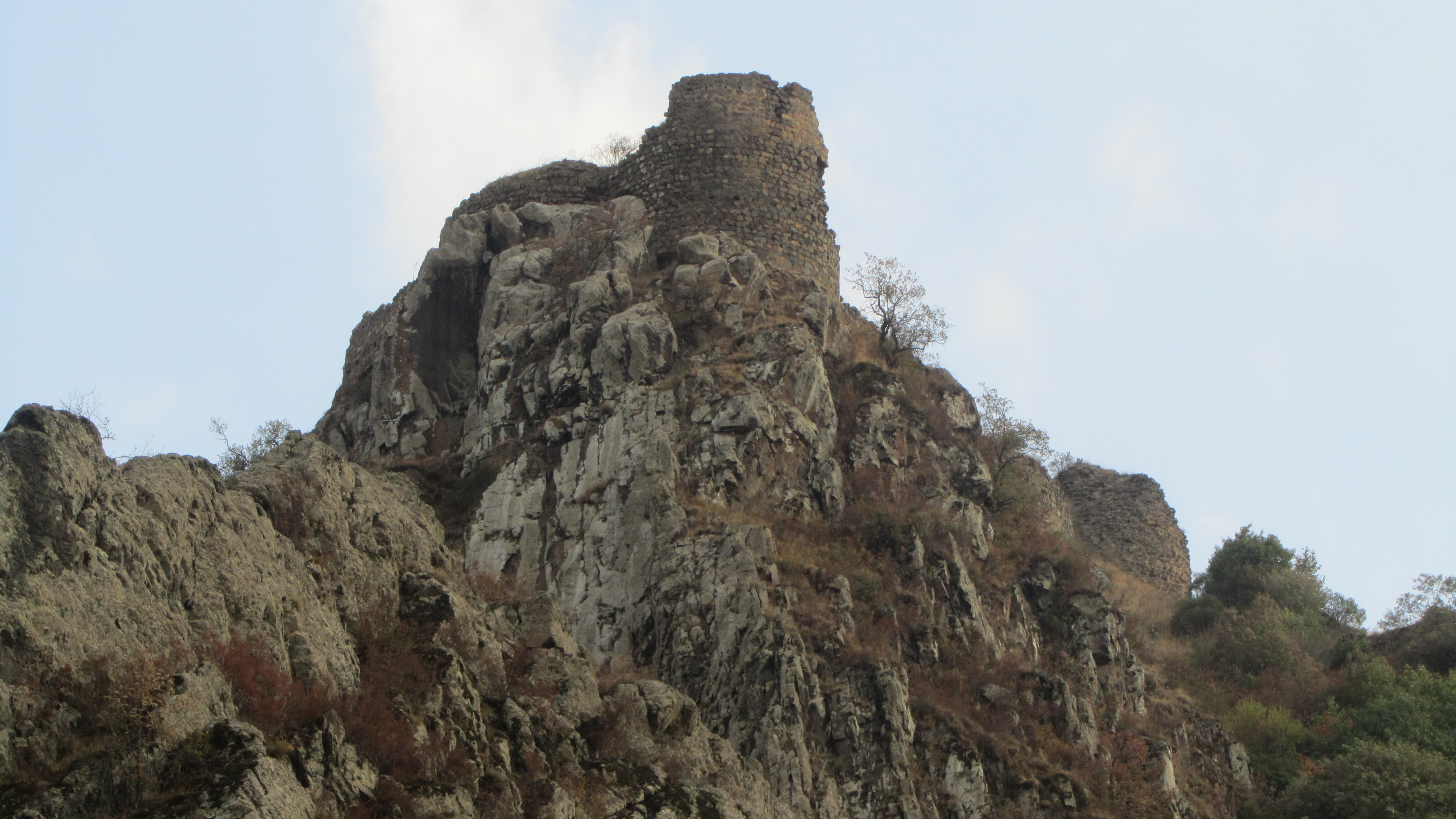 Ամրոց Բաղաբերդ (Դավիթ Բեկի բերդ) - Անդոկավան - քաղաքից ամ, Քաջա­րան տանող մայրուղուց ձախ, Ողջի գետի և նրա ձախ վտակ Գիրաթաղ գետակի միջև, բար­ձունքի վրա - Սյունիքի նշանավոր ամրոցներից էր, կիսավեր 13.1/1